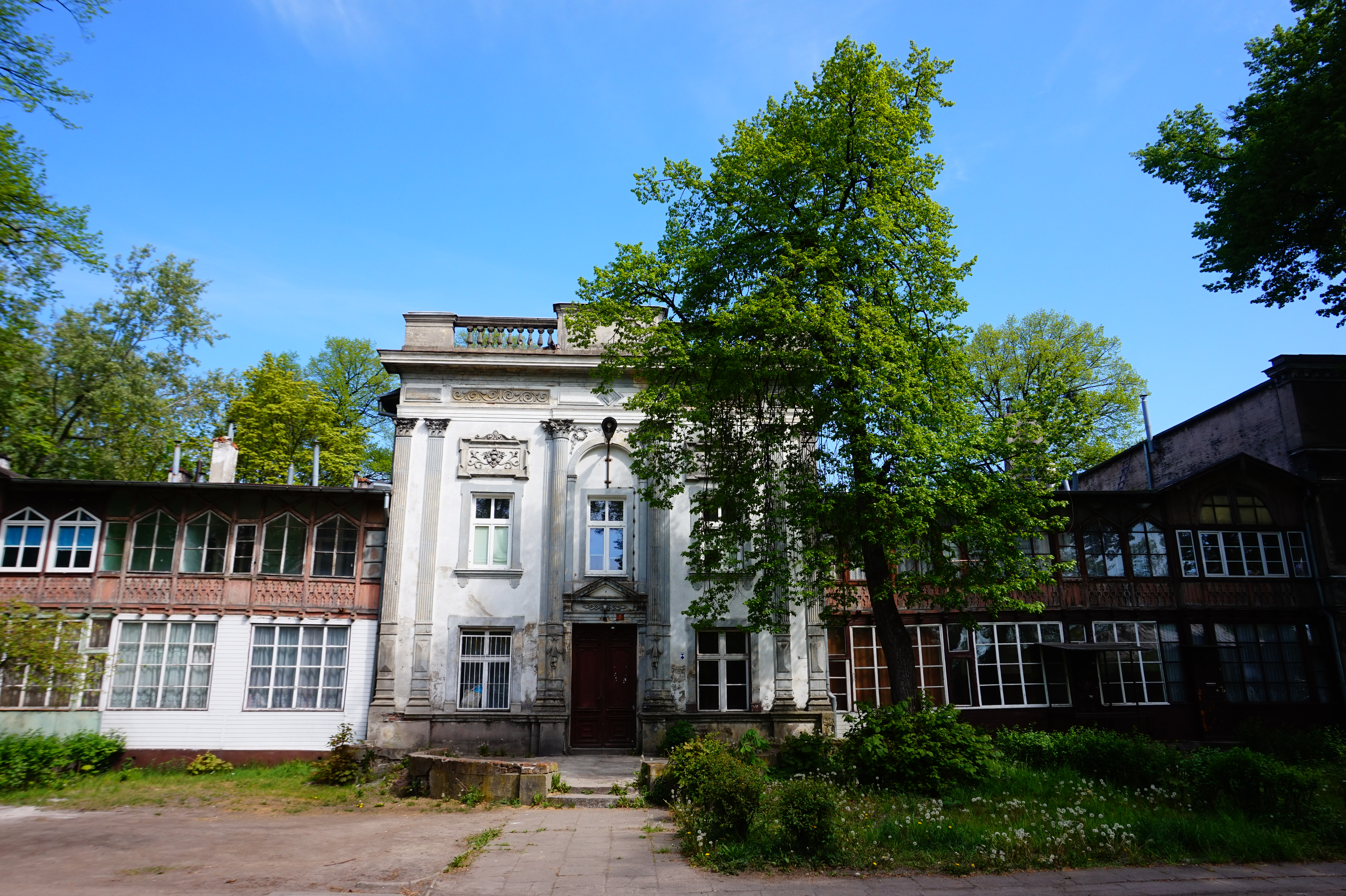 Gdańsk Brzeźno - Dom Zdrojowy